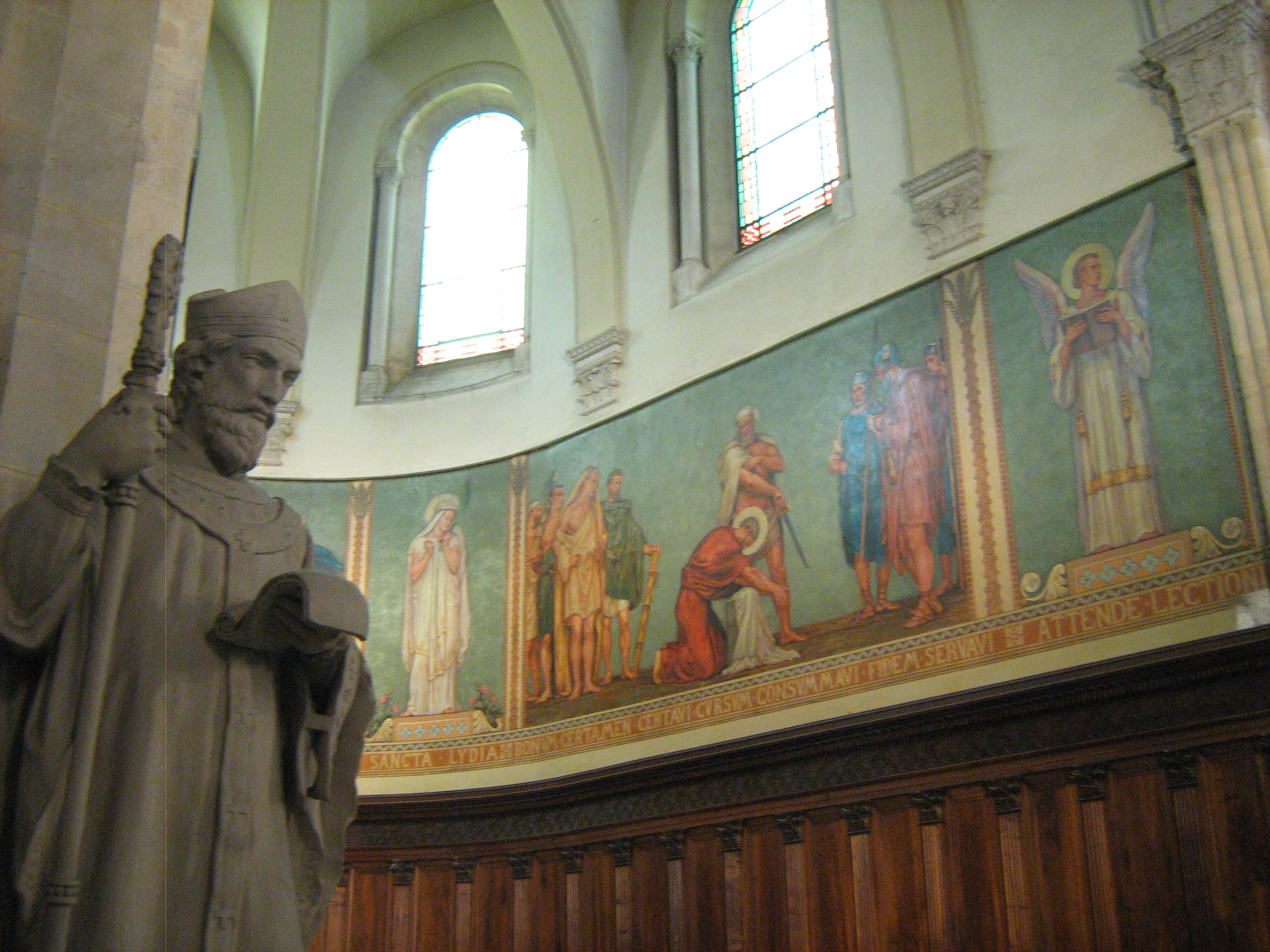 Statue de saint Sacerdos par Pierre Bonnaire et cœur de l'église Saint-Paul de Lyon. Les fresques sont de Paul Borel. .